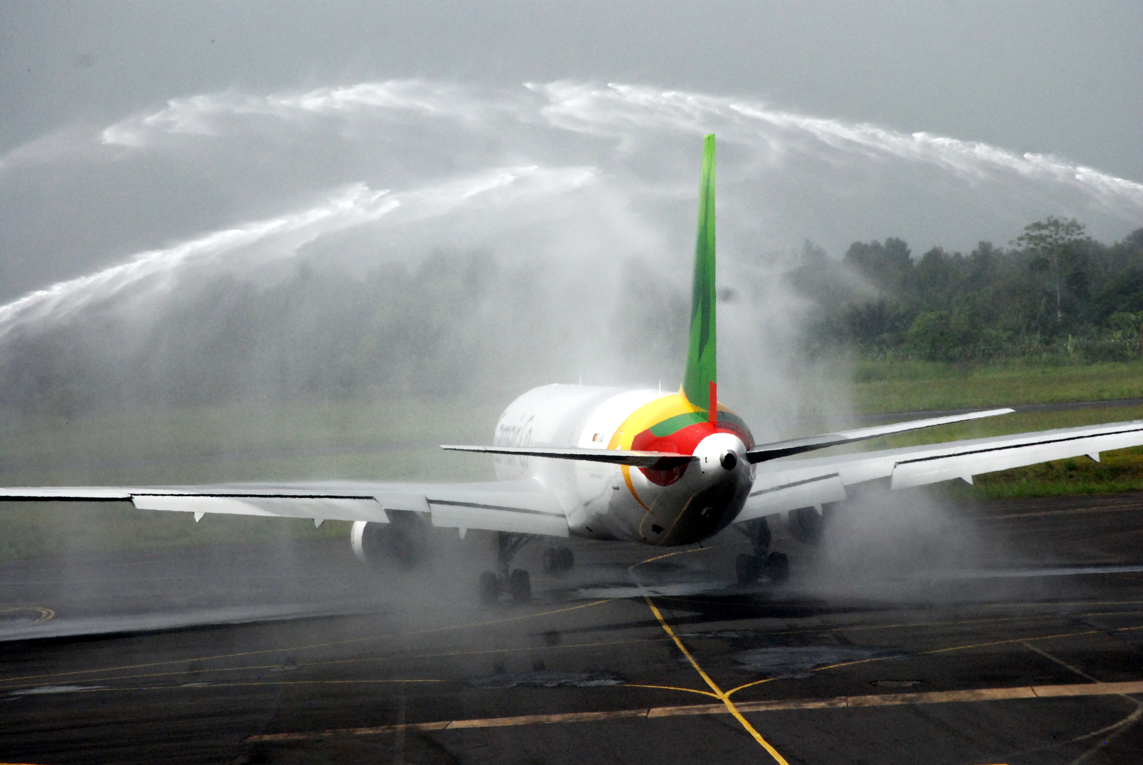 Le DJA, Boeing 767 de CAMAIRCO lors du vol inaugural à l’aéroport international de Douala au Cameroun This is an image with the theme "Africa on the Move or Transport" from: Cameroon